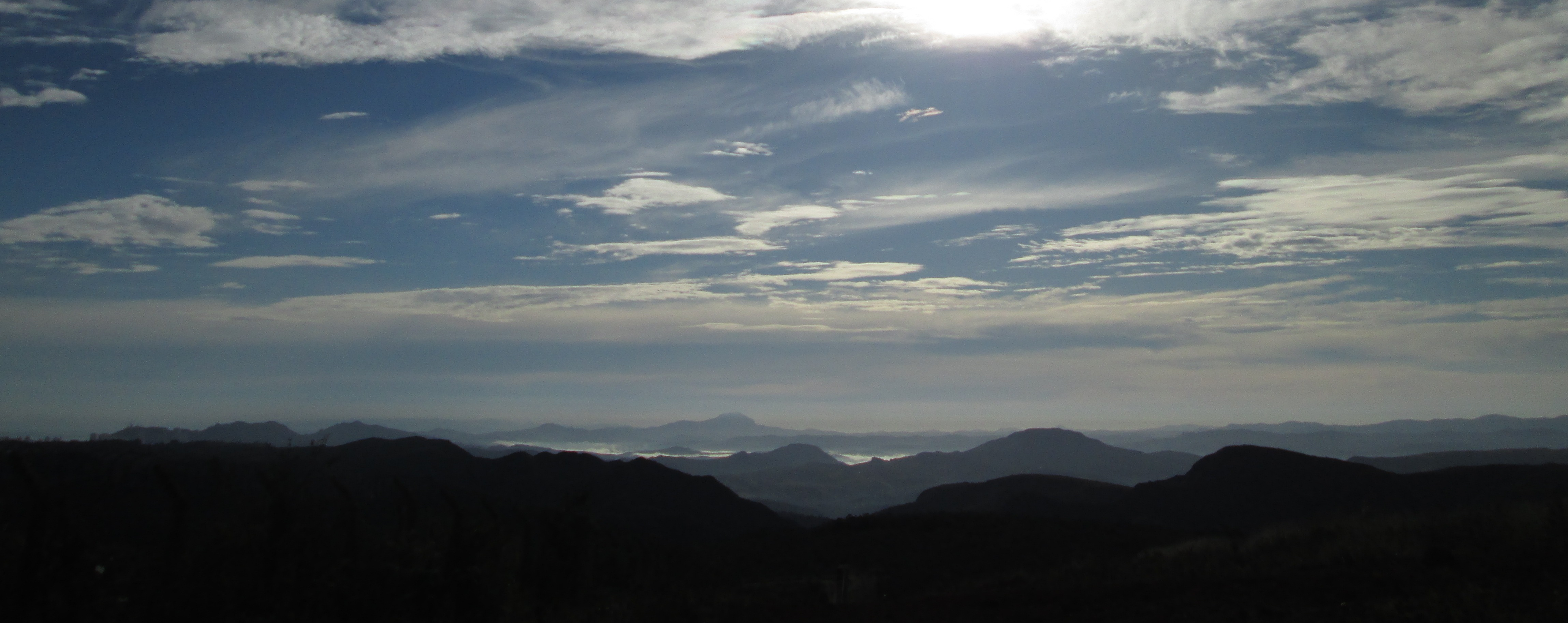 Primeiros raios de sol por sobre a Serra da Piedade